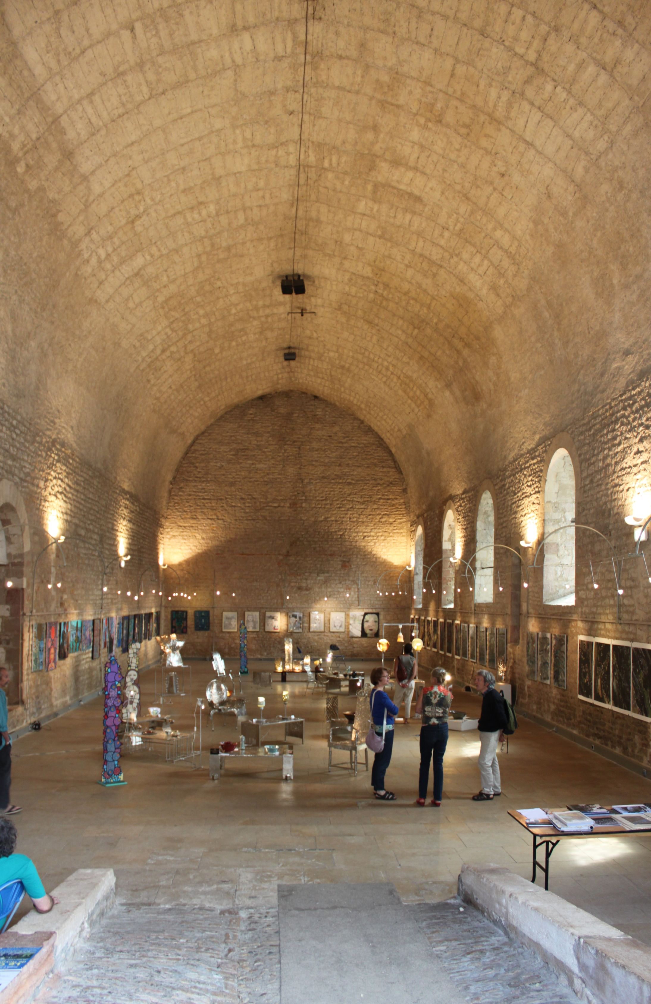 Saint-Philibert de Tournus Abbey, Tournus, Saone et Loire, Bourgogne, France